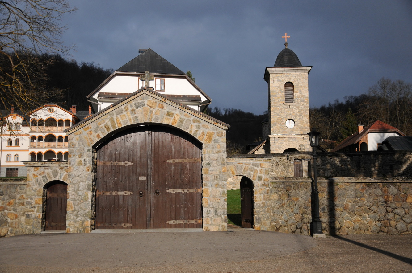 manastir gomionica selo kmecani bronzani majdan This image was uploaded as part of Trace of Soul 2015.